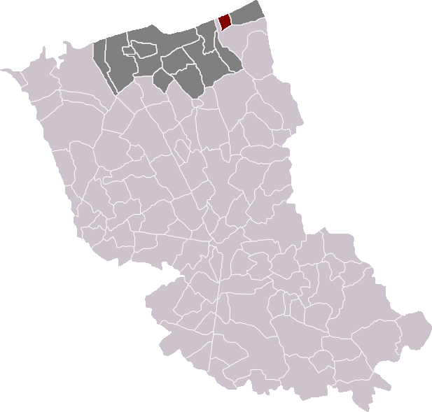 Locatie gemeente Zuidkote in arrondissement Duinkerke. Zelfgemaakt. Location of Zuydcoote municipality in the arrondissement of Dunkirk. Self made. Localisation de la commune de Zuydcoote dans l'arrondissement de Dunkerque. Fait moi-même.